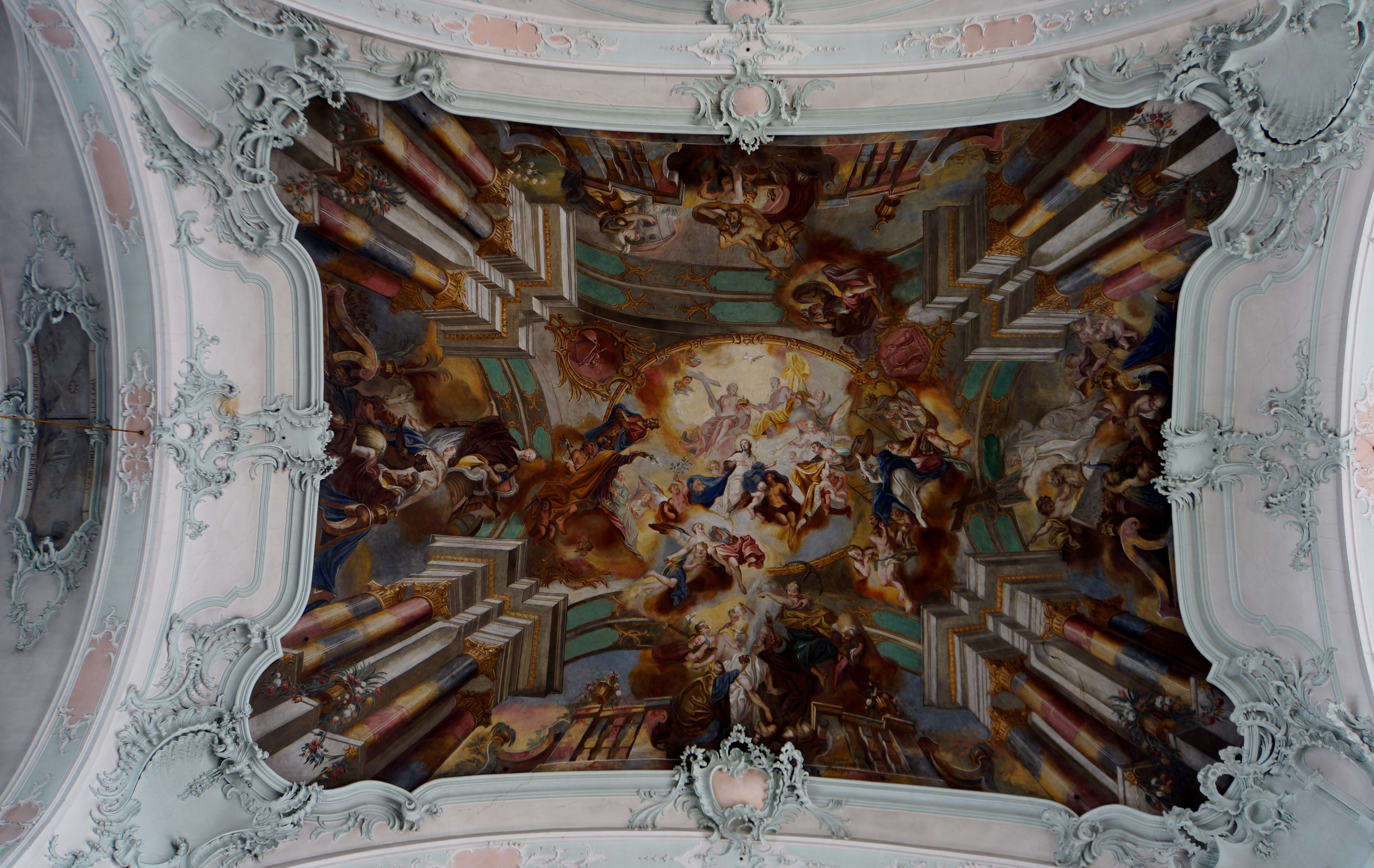 Kirche Maria Himmelfahrt Peter-Thumb-Kirche